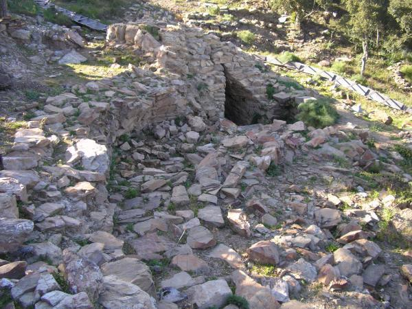 Pozzo sacro Matzanni, Iglesias